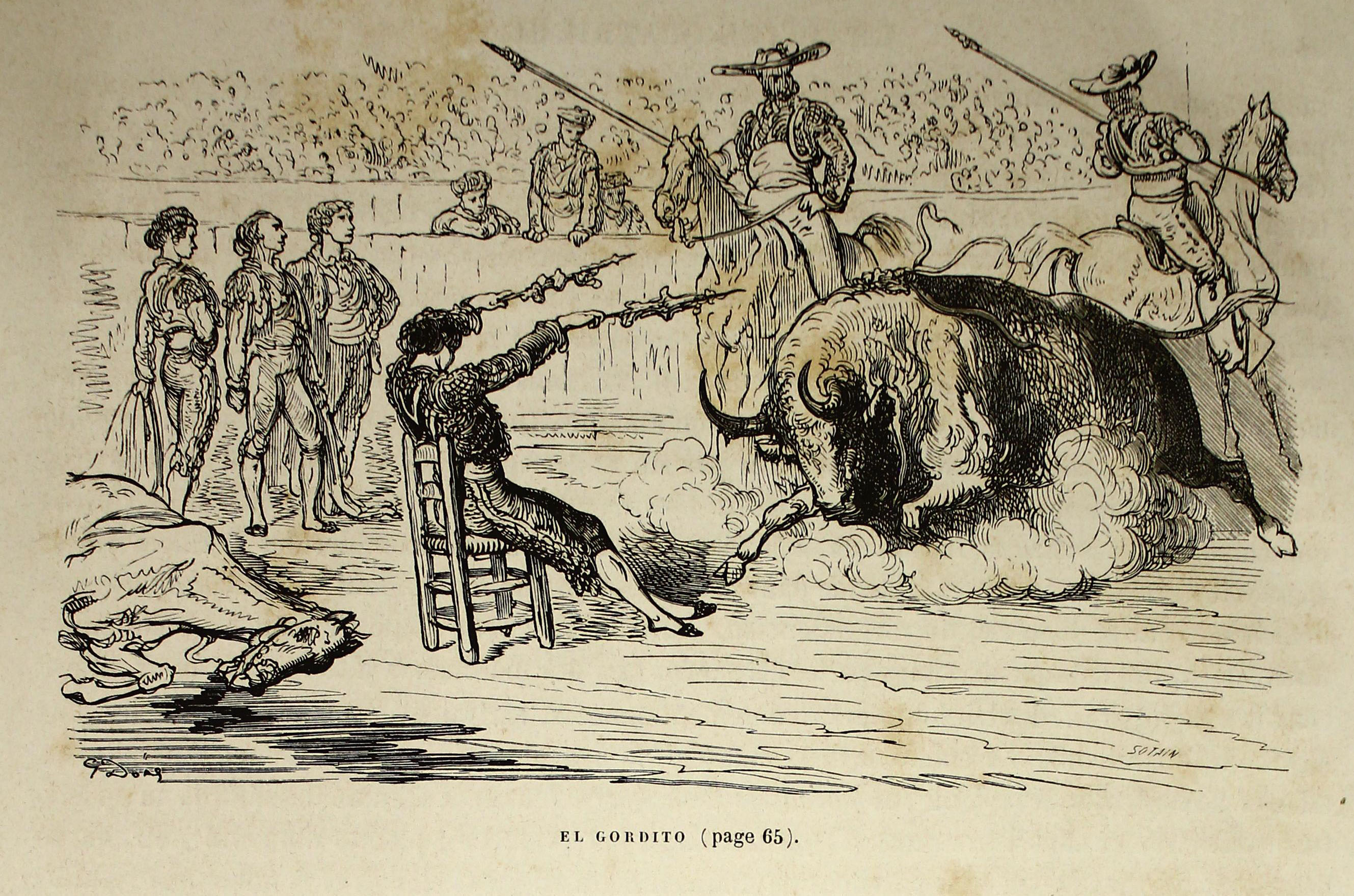 Autor: Davillier, Jean Charles, barón, 1823-1883 Descripción bibliográfica: L'Espagne / par Le Baron CH. Davillier ; ilustrée de 309 gravures dessinées su bois par Gustave Doré. - Paris : Librairie Hachette, 1874. - 799 p. : il. Materia: España- Geografía Materia: España- Usos y costumbres Ilustrador: Doré, Gustave, 1832-1883 Editor: Libreria Hachette Lugar de impresión: Francia, París Localización: Libro completo